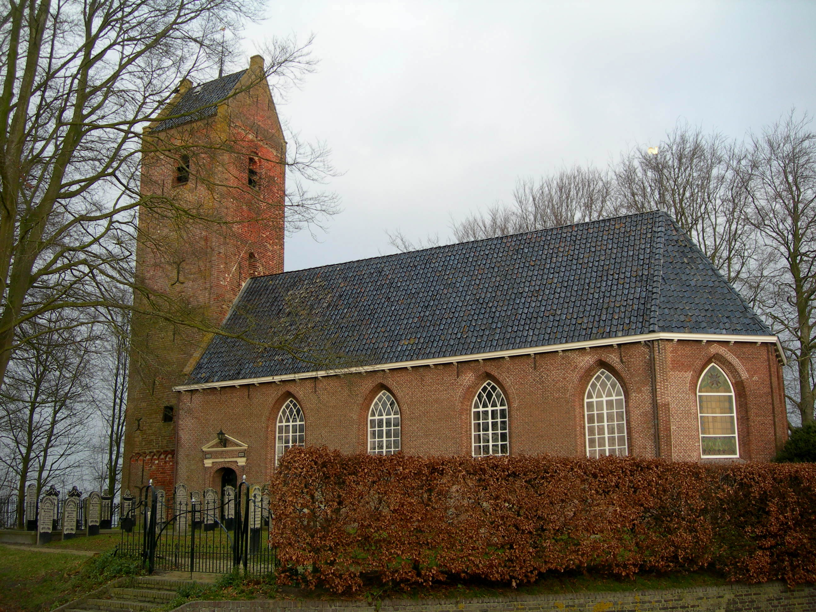 N.H.Kerk Twijzel